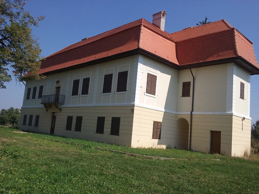 Castelul Brâncoveanu sat Sâmbăta de Sus; comuna Sâmbăta de Sus 615 sec. XVIII - XIX 01